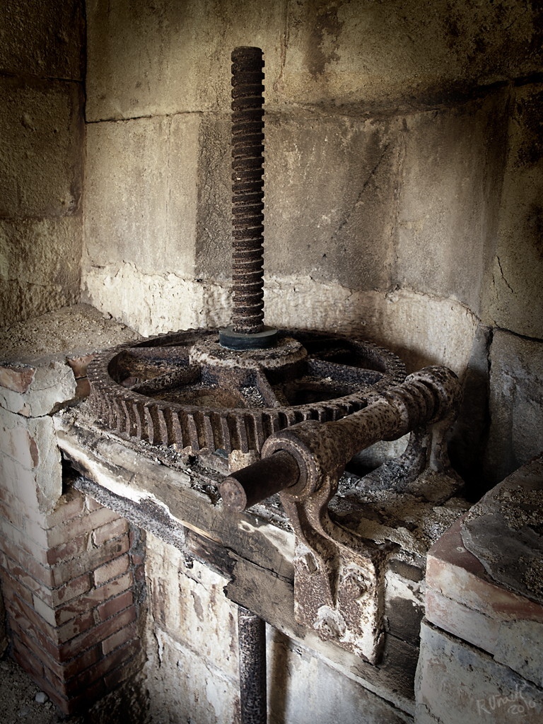 Mecanismo de apertura del aliviadero del pantano de Elda